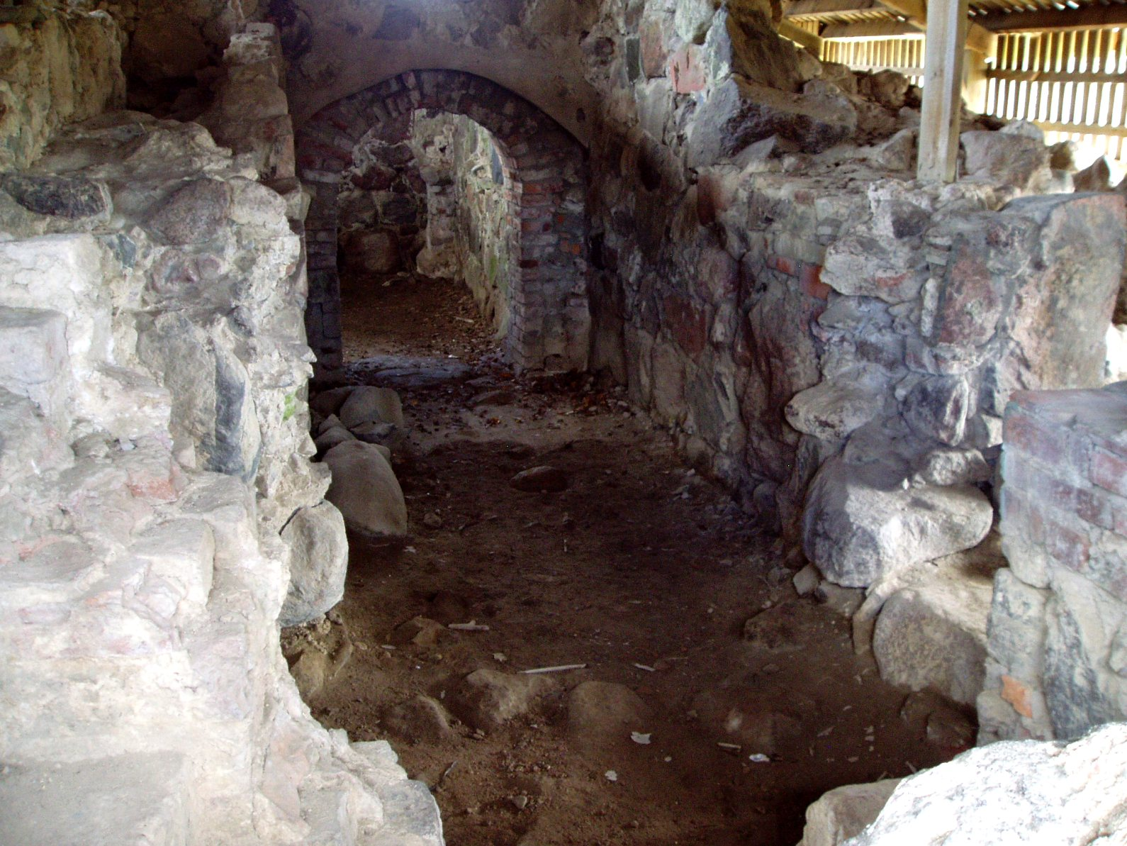 Tunaborgen i Österskär, ingångshall